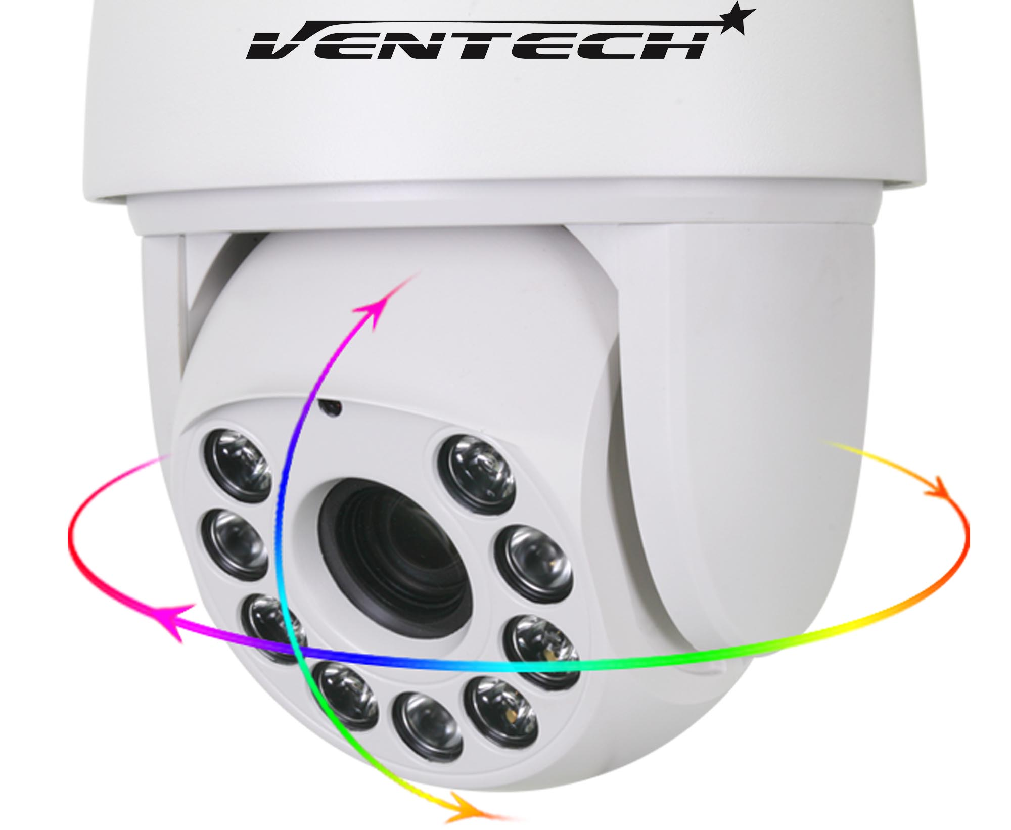 camara ptz con zoom ventech de 30x